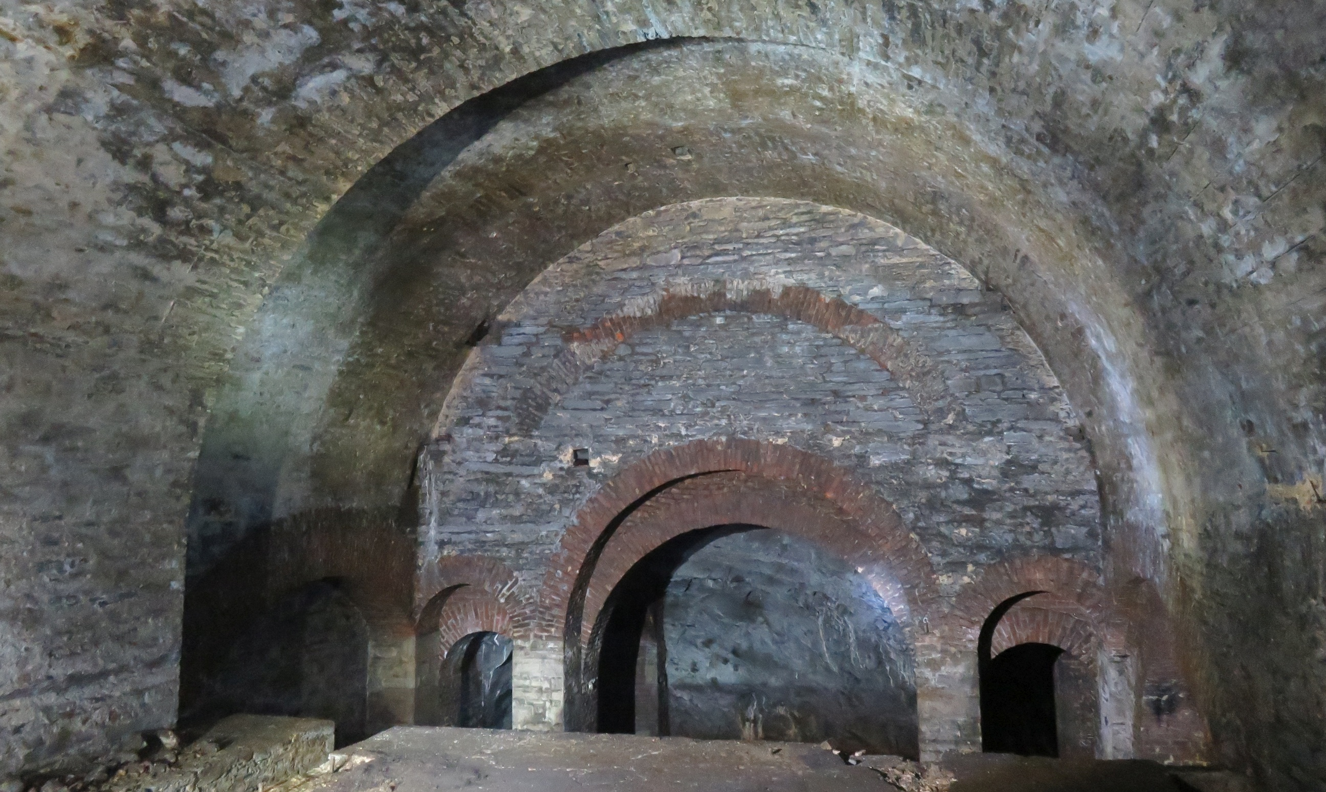 Grube Landeskrone, Wilnsdorf-Wilden, Kreis Siegen-Wittgenstein. Schachthalle, Blick Richtung Schachtstandort.